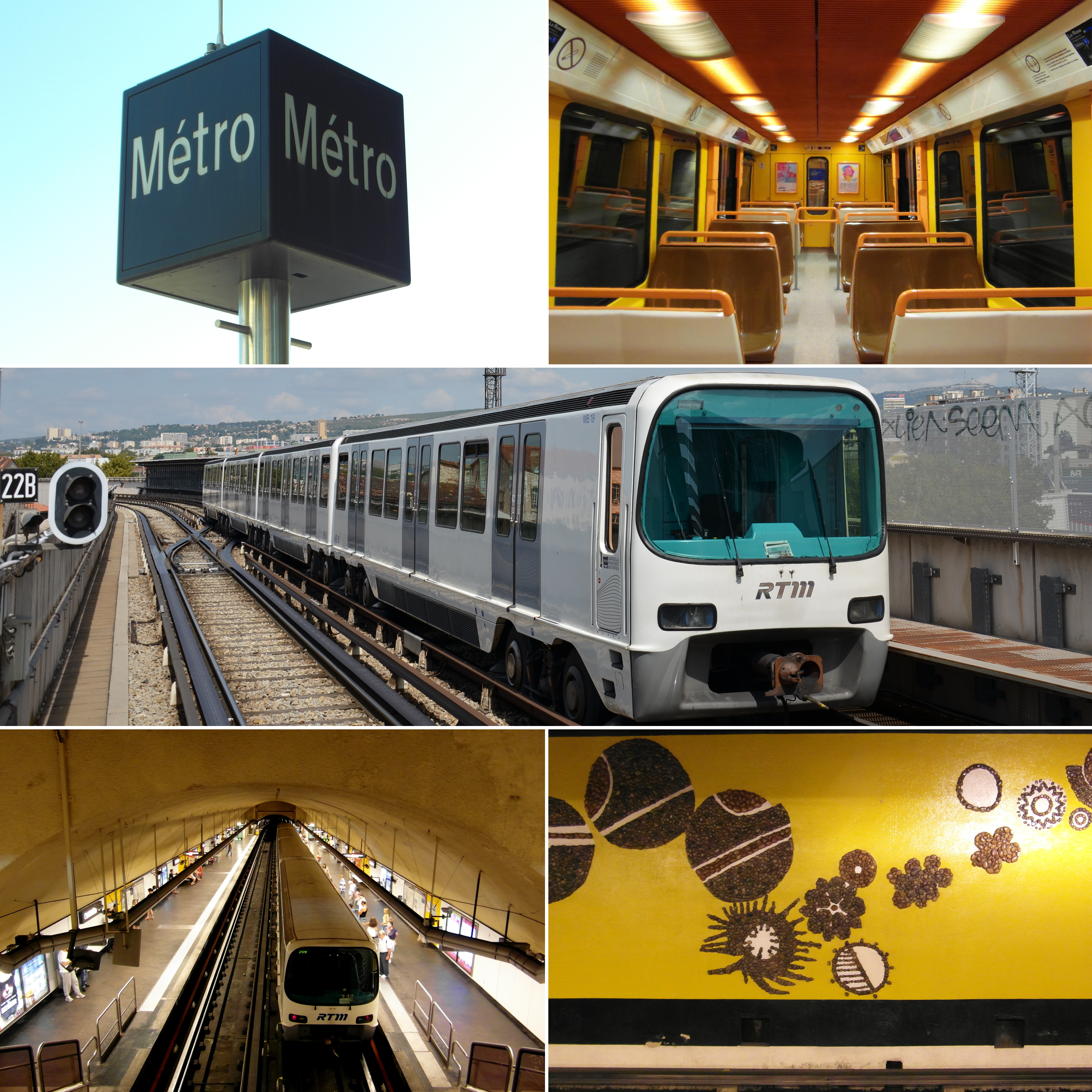 Mosaïque de photos du métro de Marseille. En haut à gauche : panneau d'entrée de la station Saint-Barnabé. En haut à droite : intérieur d'une rame. Milieu : rame MPM76 entrant à la station Bougainville. En bas à gauche : une rame de la ligne 2 à la station Castellane. En bas à droite : décorations au dessus des voix de la station Vieux-Port.